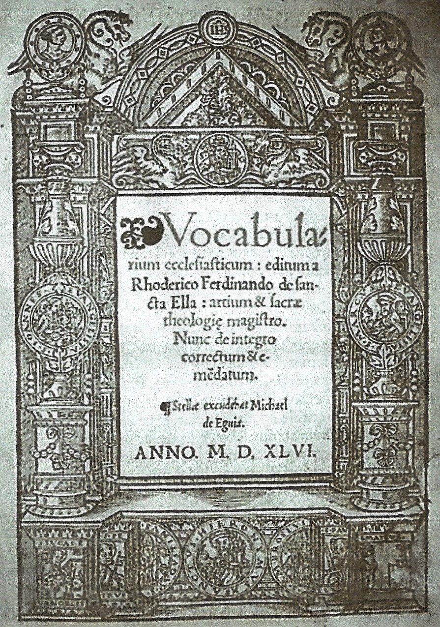 Portada de Vocabularium ecclesiasticum, de Rodrigo Fernández de Santaella. Miguel de Eguía, impresor, Estella (Navarra) 1546